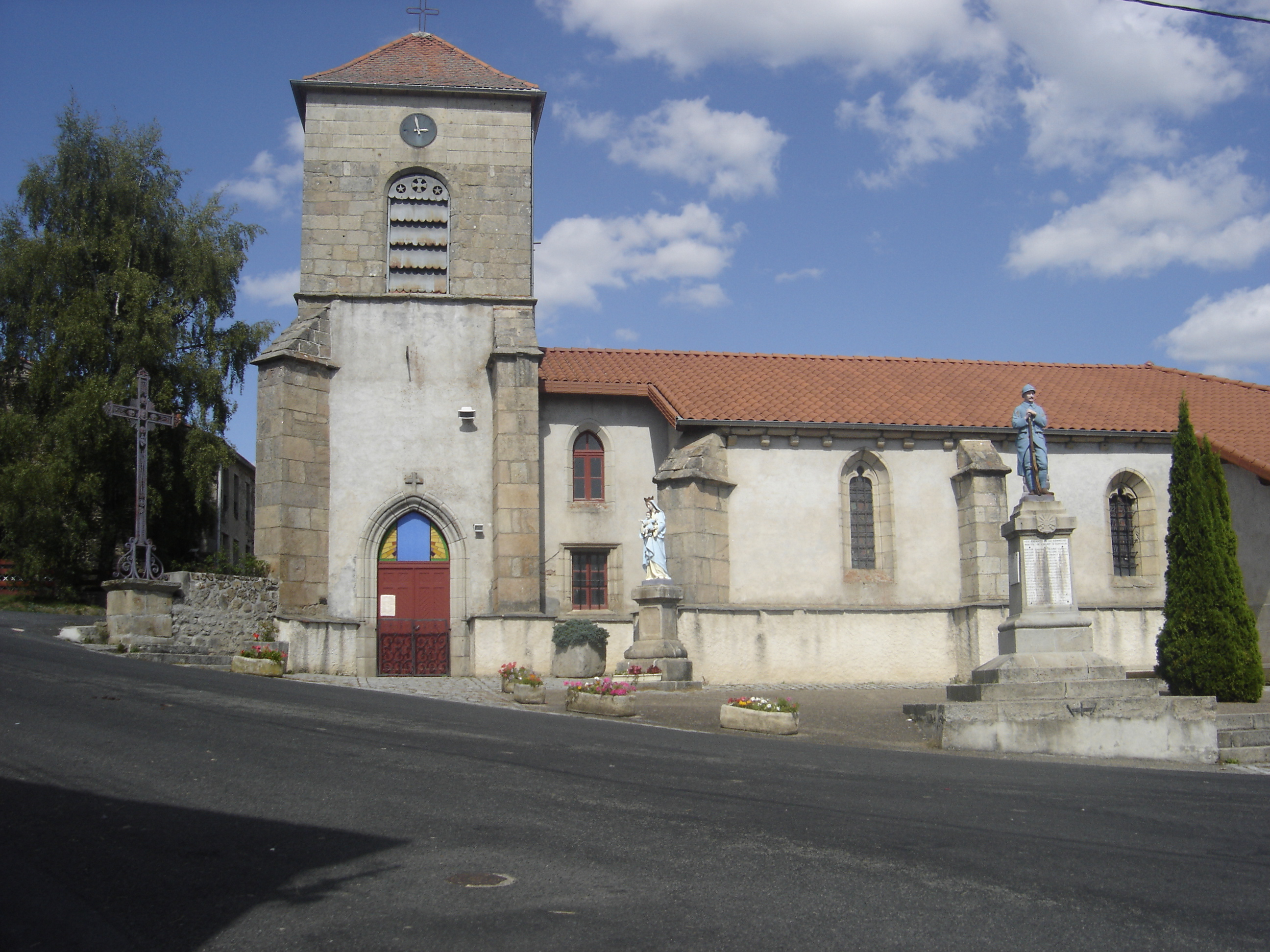 Sembadel bourg